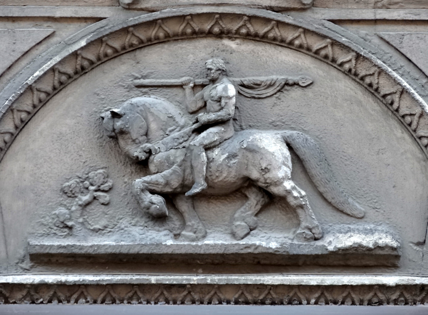 Kamienica przy ul. Dworcowej 67 w Bydgoszczy (1912-1913, aut. Otto Walther)